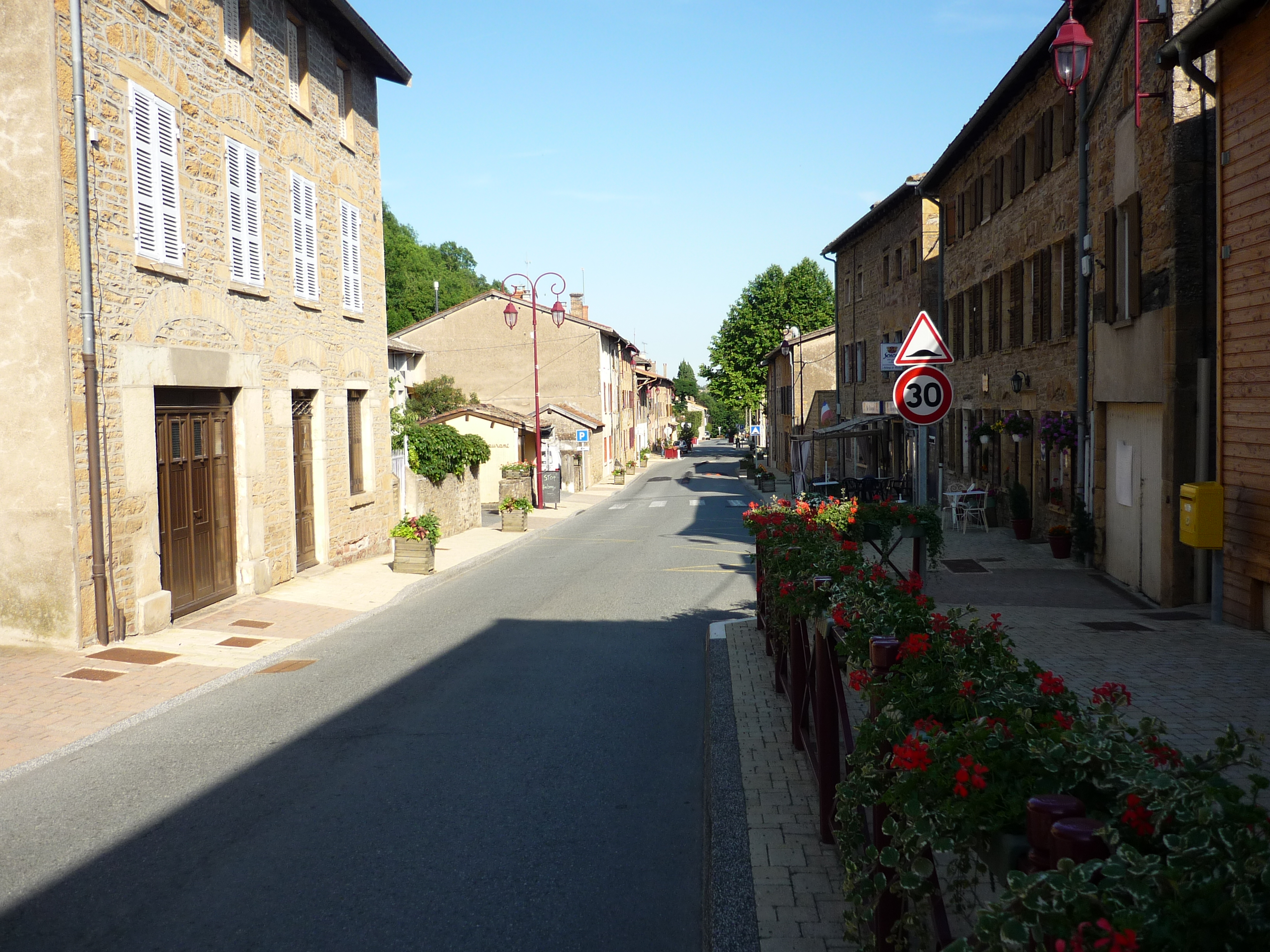 Traversée du village de Rivolet dans le Rhône par la départementale 504